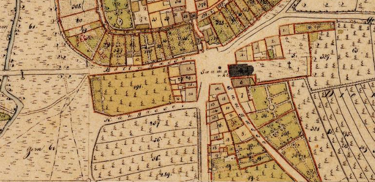 Obere Vorstadt Volkach, Aufnahme im Urkataster Bayern Anfang des 19. Jahrhunderts